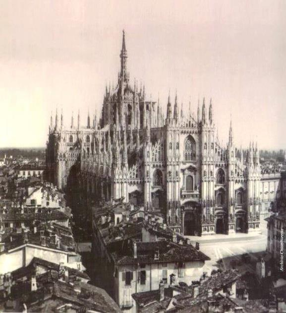 Piazza del Duomo a Milano a metà del XIX secolo